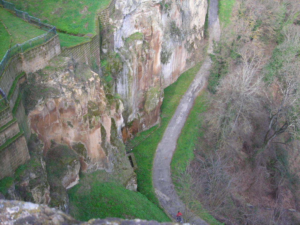 Orvieto - Parete della rupe su cui sorge la città